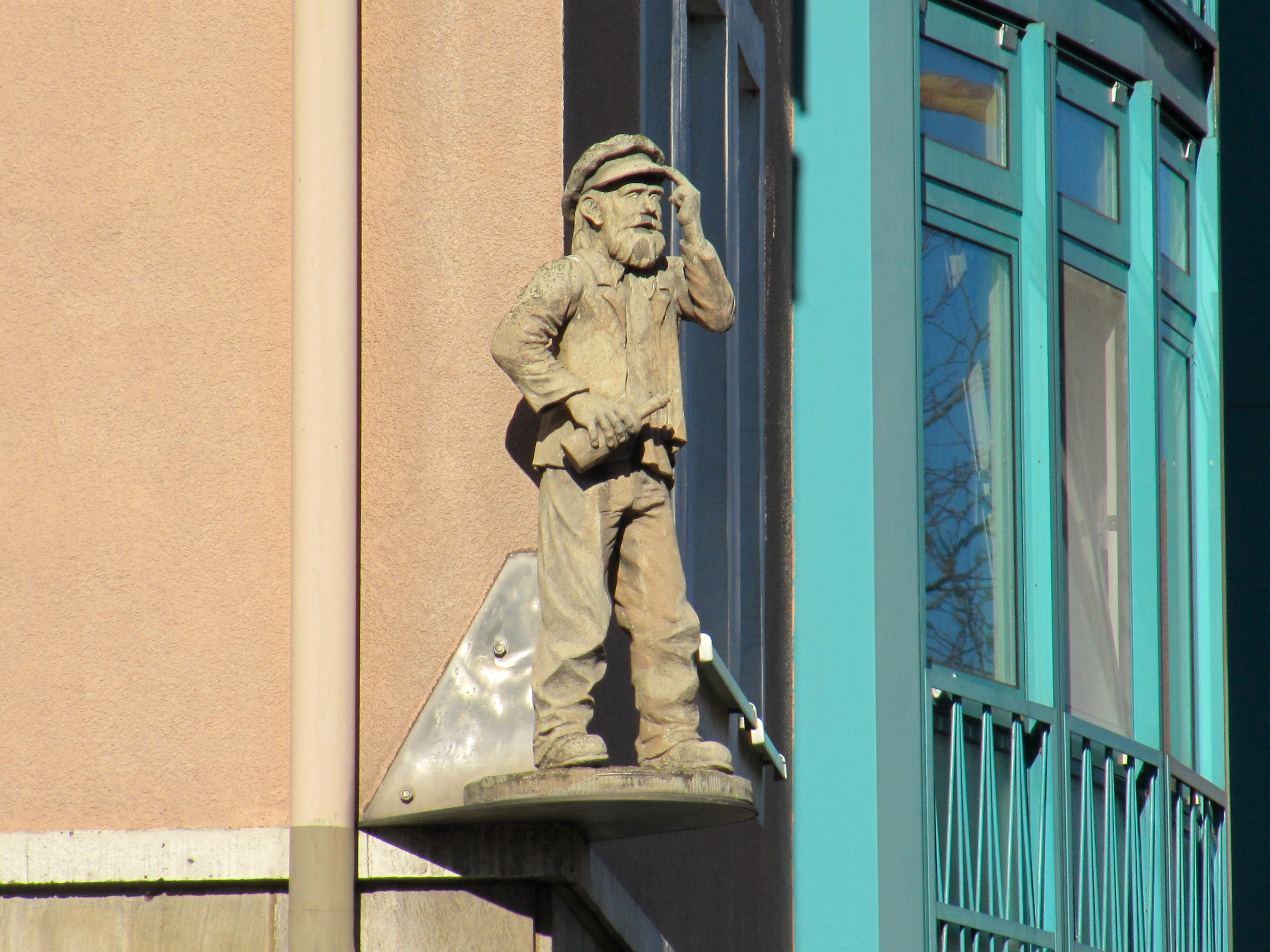 Kleine Sandsteinfigur vom Dessauer Original Hobusch an der Hausecke Askanische Straße / Steinstraße.